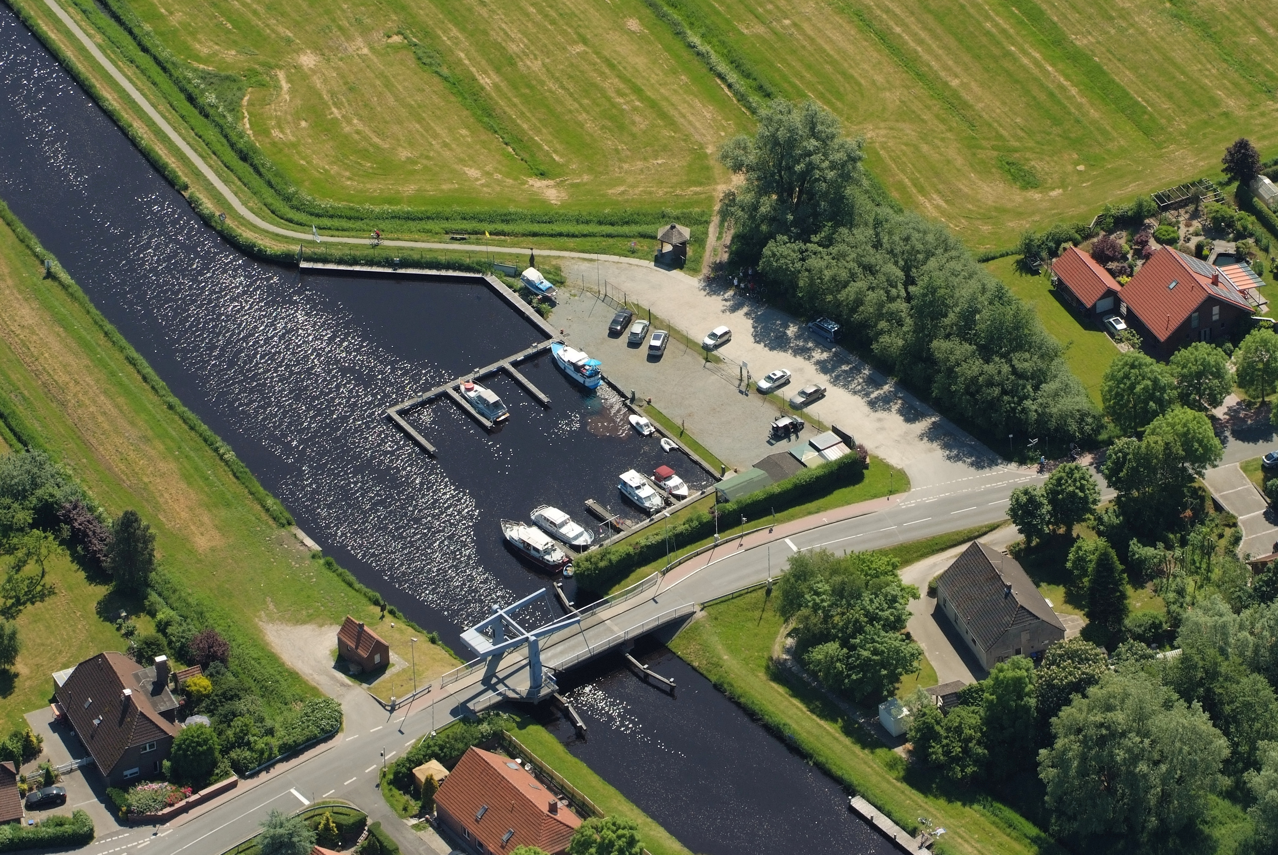 Fotoflug vom Flugplatz Nordholz-Spieka über Cuxhaven und Wilhelmshaven